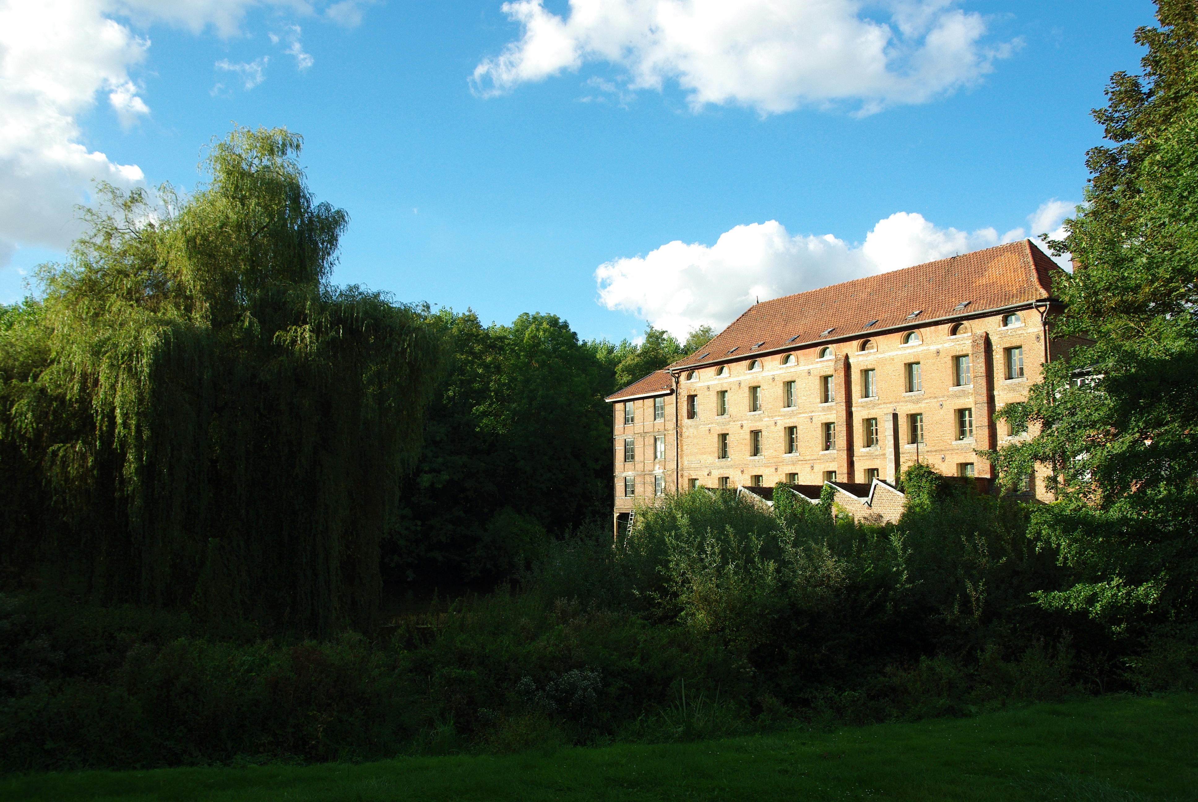 Moulin de Lucy .